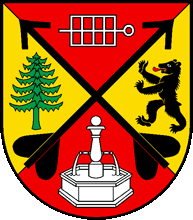 Wappen von Le-Mouret Kanton Freiburg Schweiz